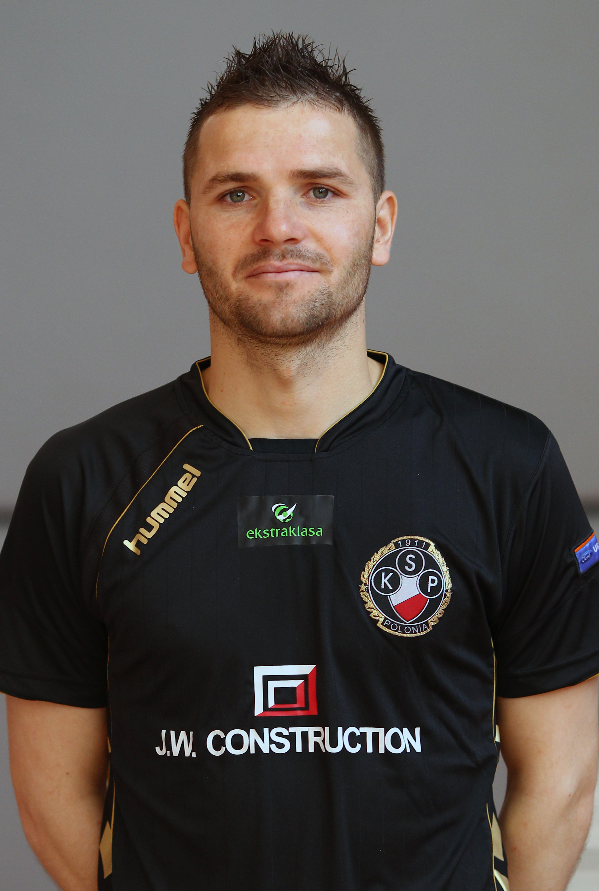 Tomasz Brzyski, player of Polonia Warszawa (2011)